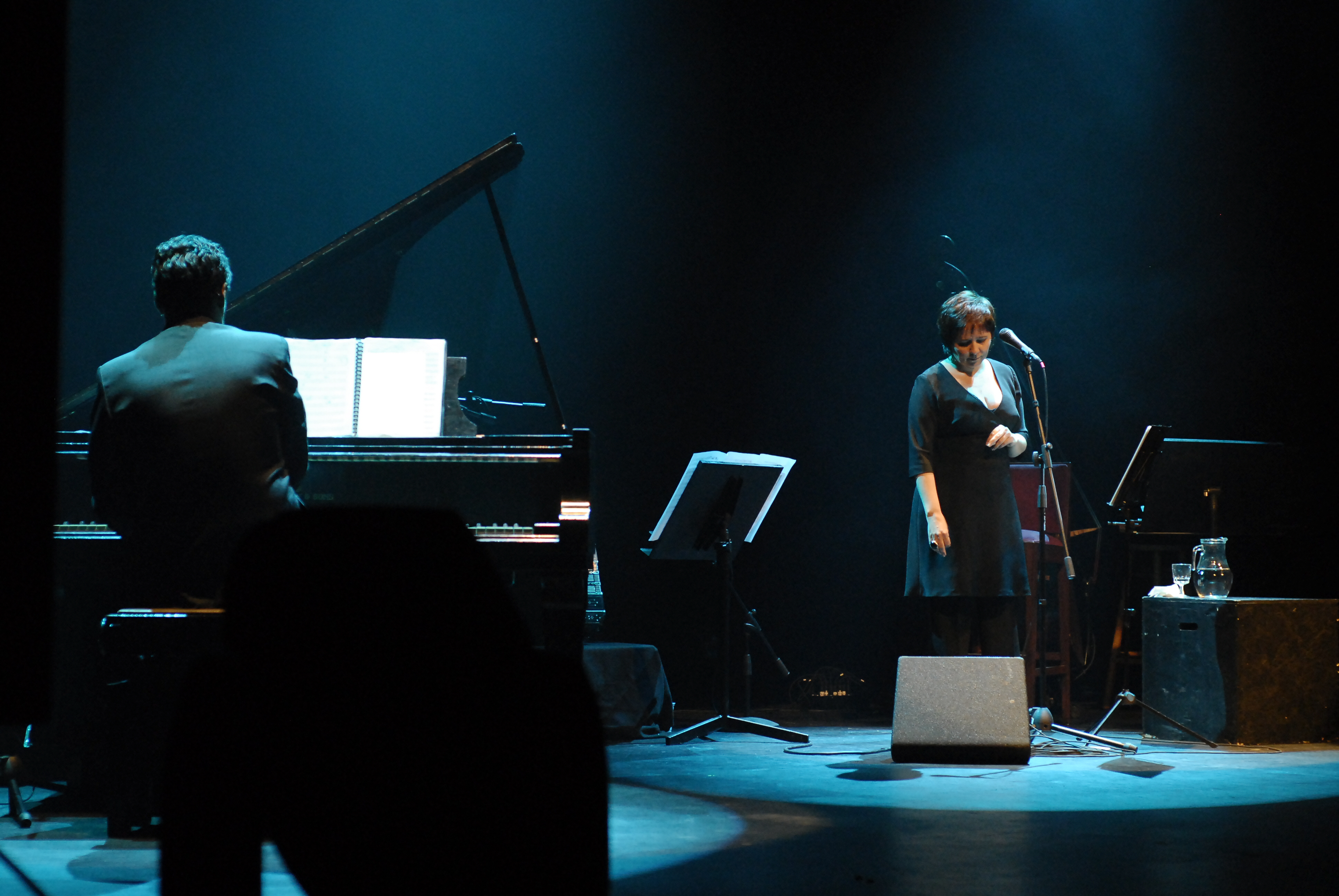 Fotografía de la compositora y cantante de música popular uruguaya Laura Canoura, junto a el también musico Sebastián Larrosa en un concierto en el Teatro Solís de Montevideo.